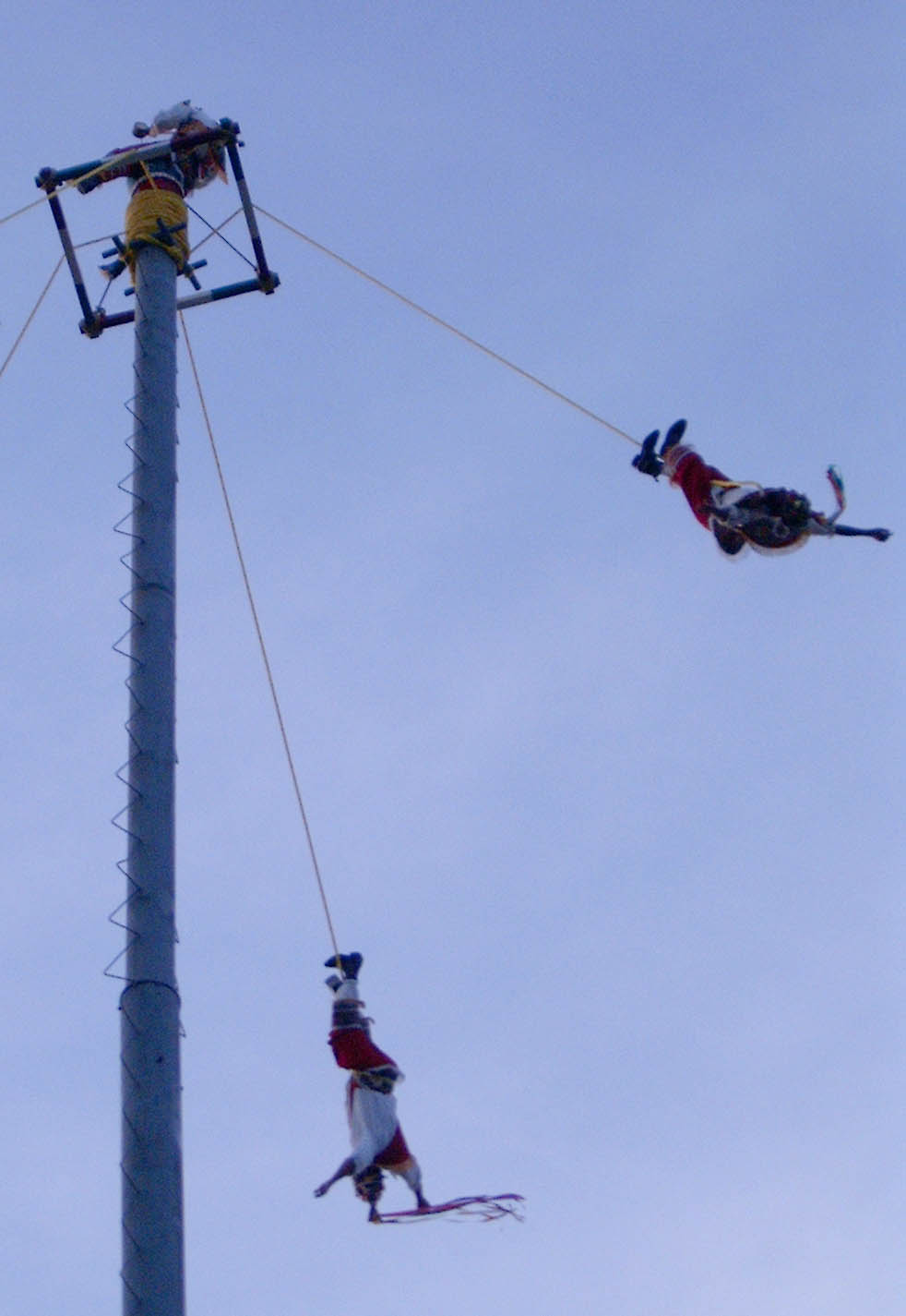 Danza ritual de los Voladores de México, en el Festival Internacional de Arte Sacro 2005 de Bilbao (España).